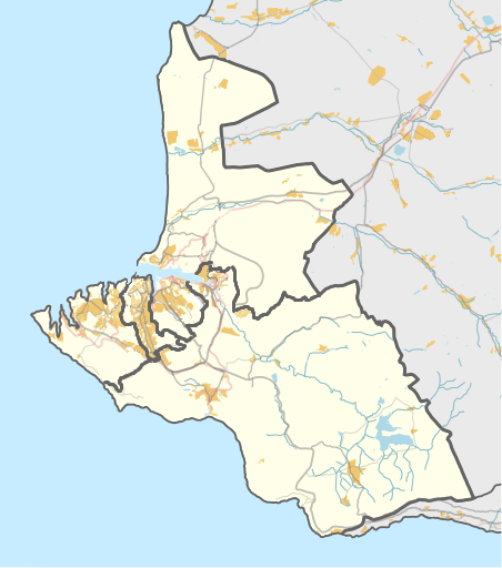 Административно-территориальное деление города Севастополя